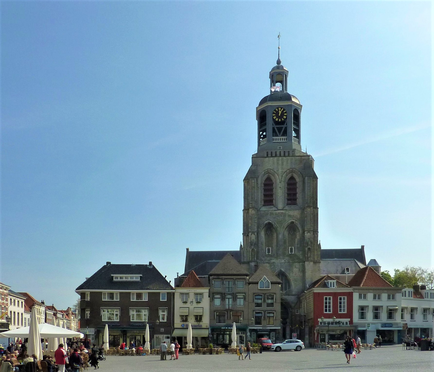 Sint-Gertrudiskerk (Bergen op Zoom)